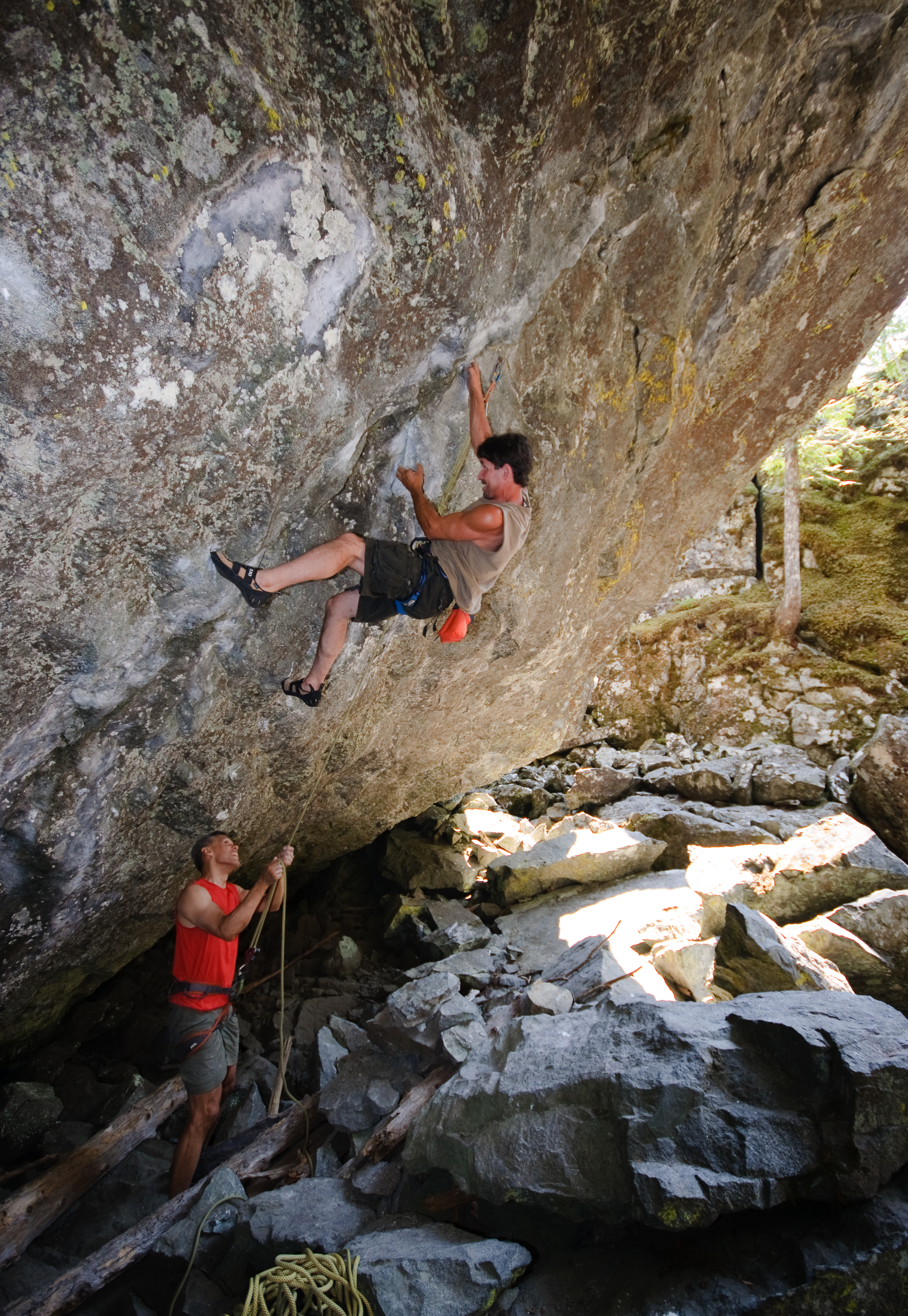 Climbing an overhanging rock